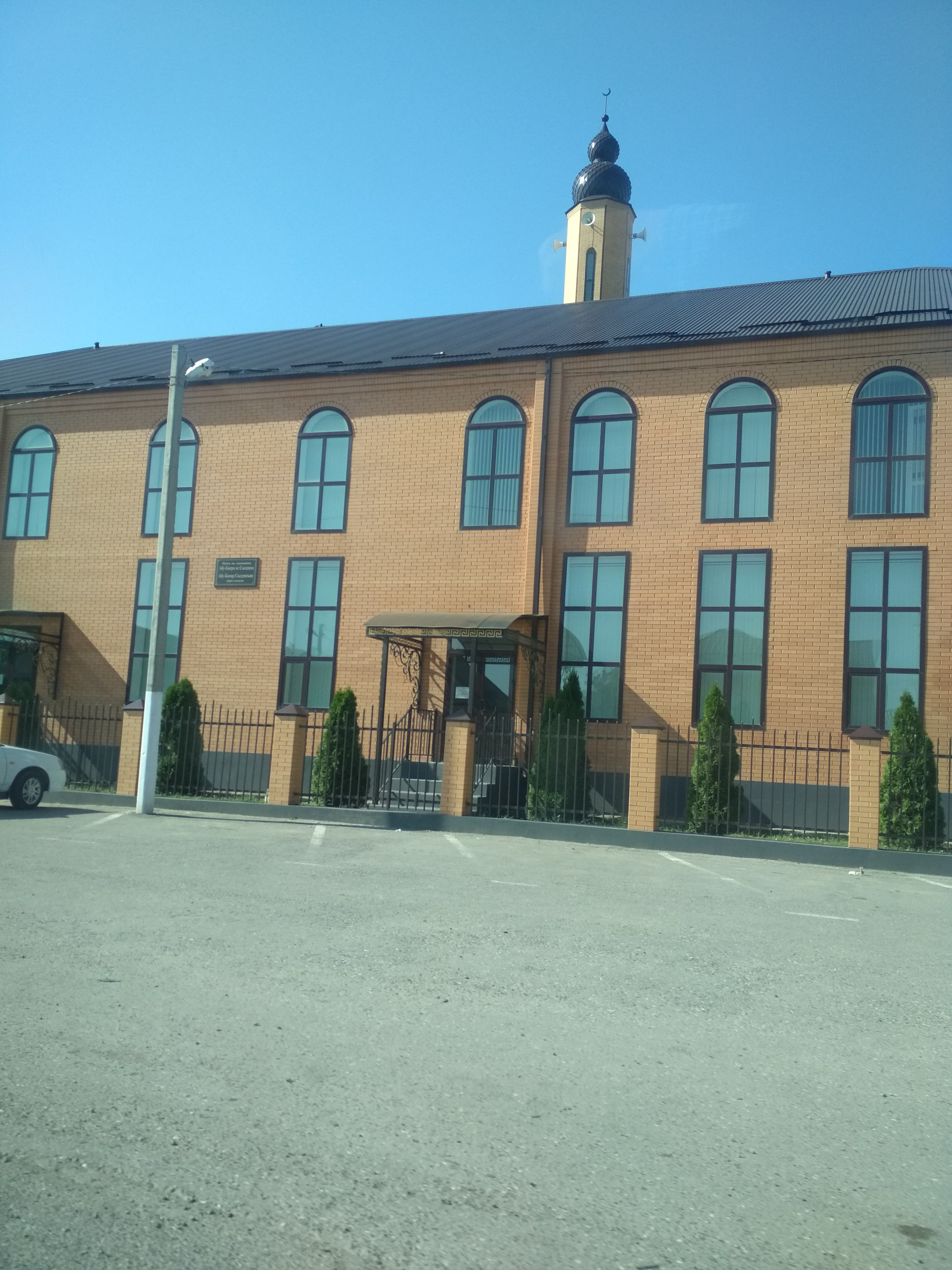 Нохчийн: Гребенски маьждиг